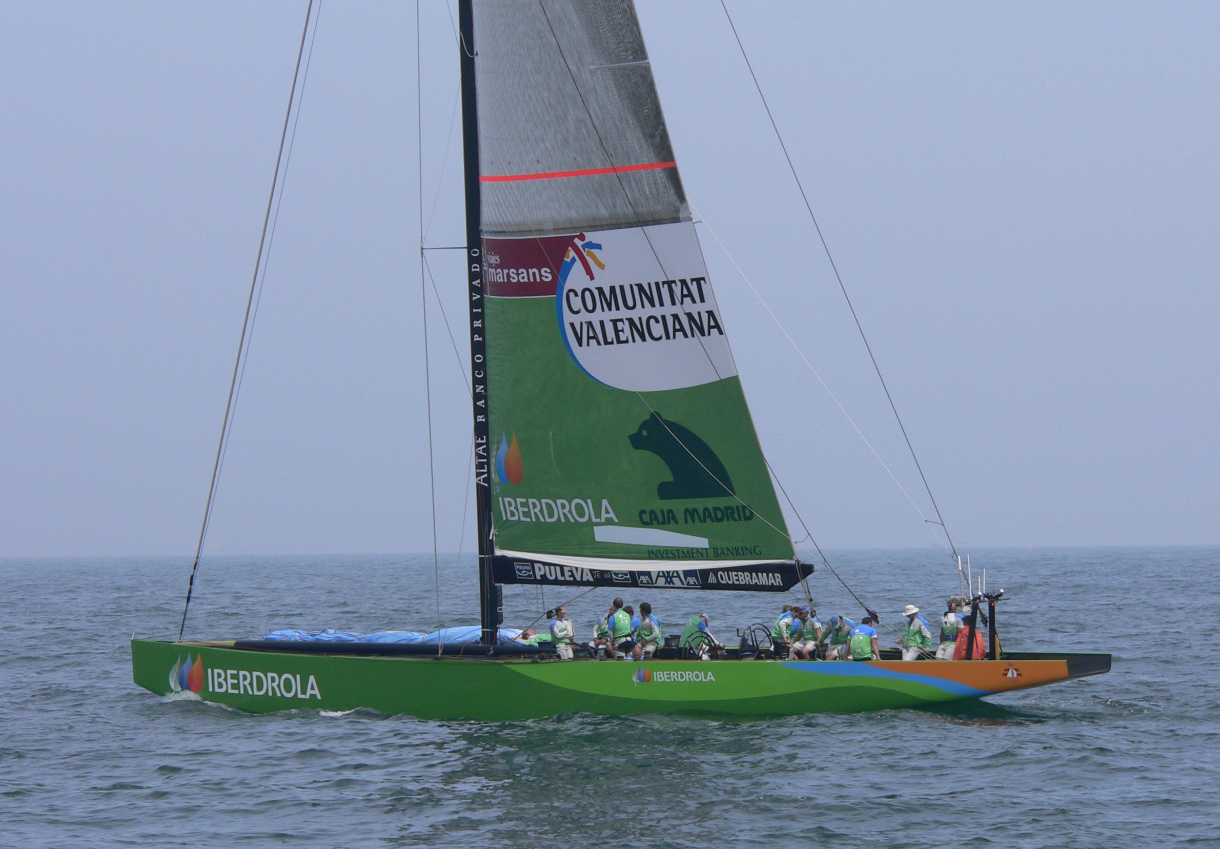 America´s Cup 2007 ESP 97 Desafío Español